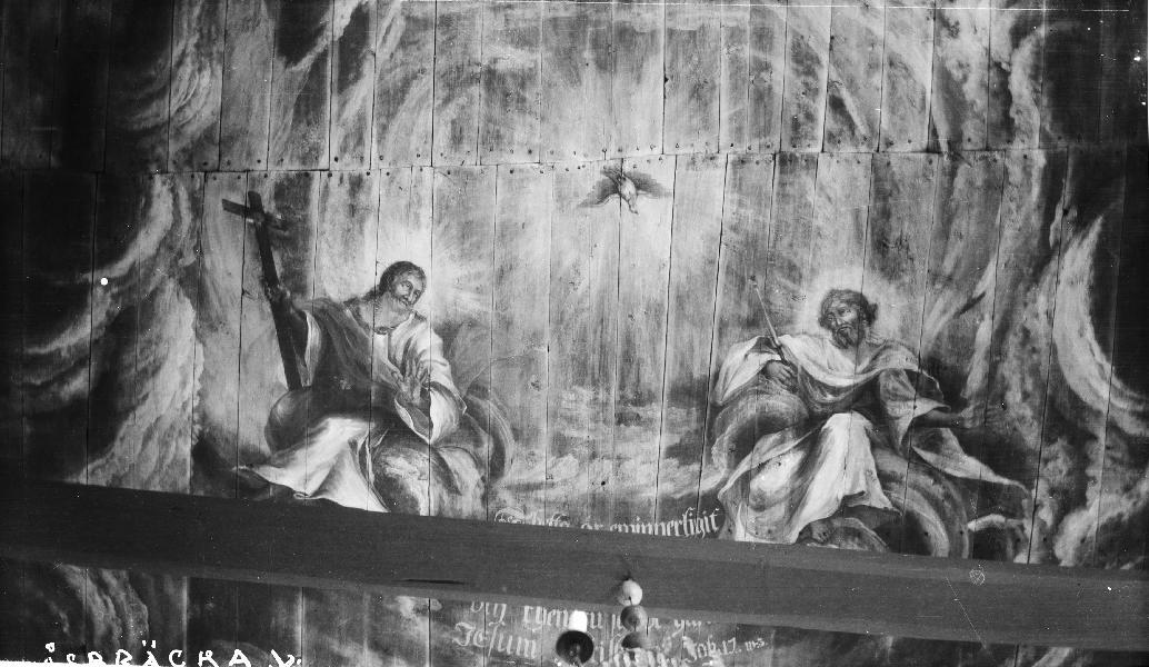 Kyrkans innertak, som är tunnvälvt och prydd med målningar från 1761 av Carl Gustav Sandberg. Motiv: Treenigheten och Yttersta domen m.m. Snabbinv. Kategori: (03) Målningar på trä Kyrkans innertak, som är tunnvälvt och prydd med målningar från 1761 av Carl Gustav Sandberg. Motiv: Treenigheten och Yttersta domen m.m. Snabbinv.